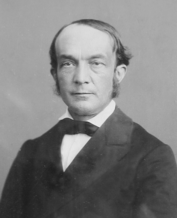 Prof. D. Dr. Otto Zöckler